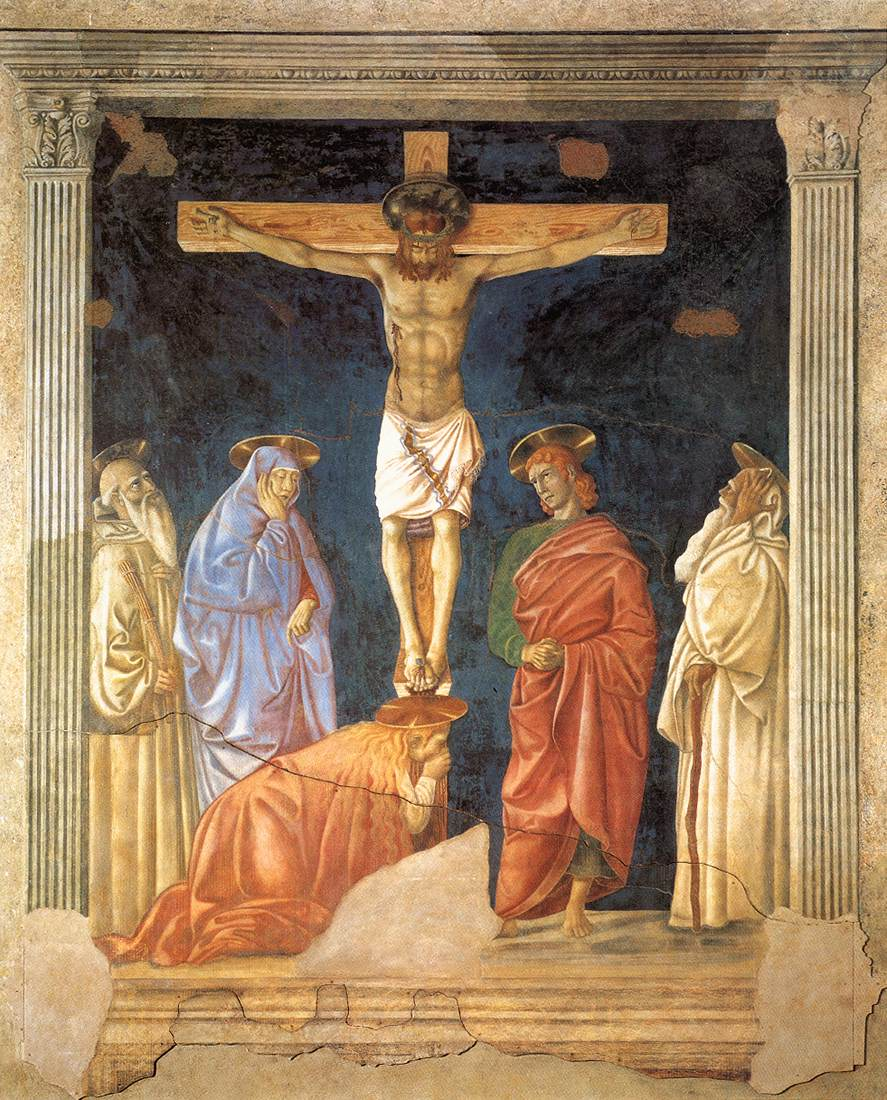 ANDREA DEL CASTAGNO Crucifixion and Saints Fresco Ospedale Santa Maria Nuova, Florence